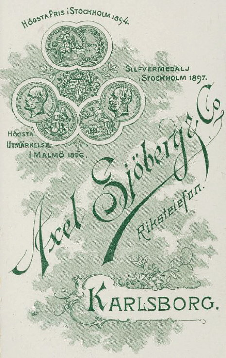 Axel Sjöberg, fotograf, Karlsborg, reklamblad